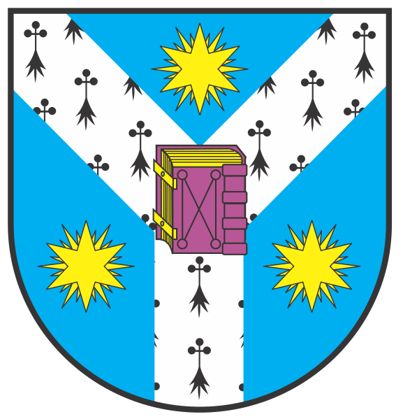 Logo der Alexandru-Ioan-Cuza-Universität Iași